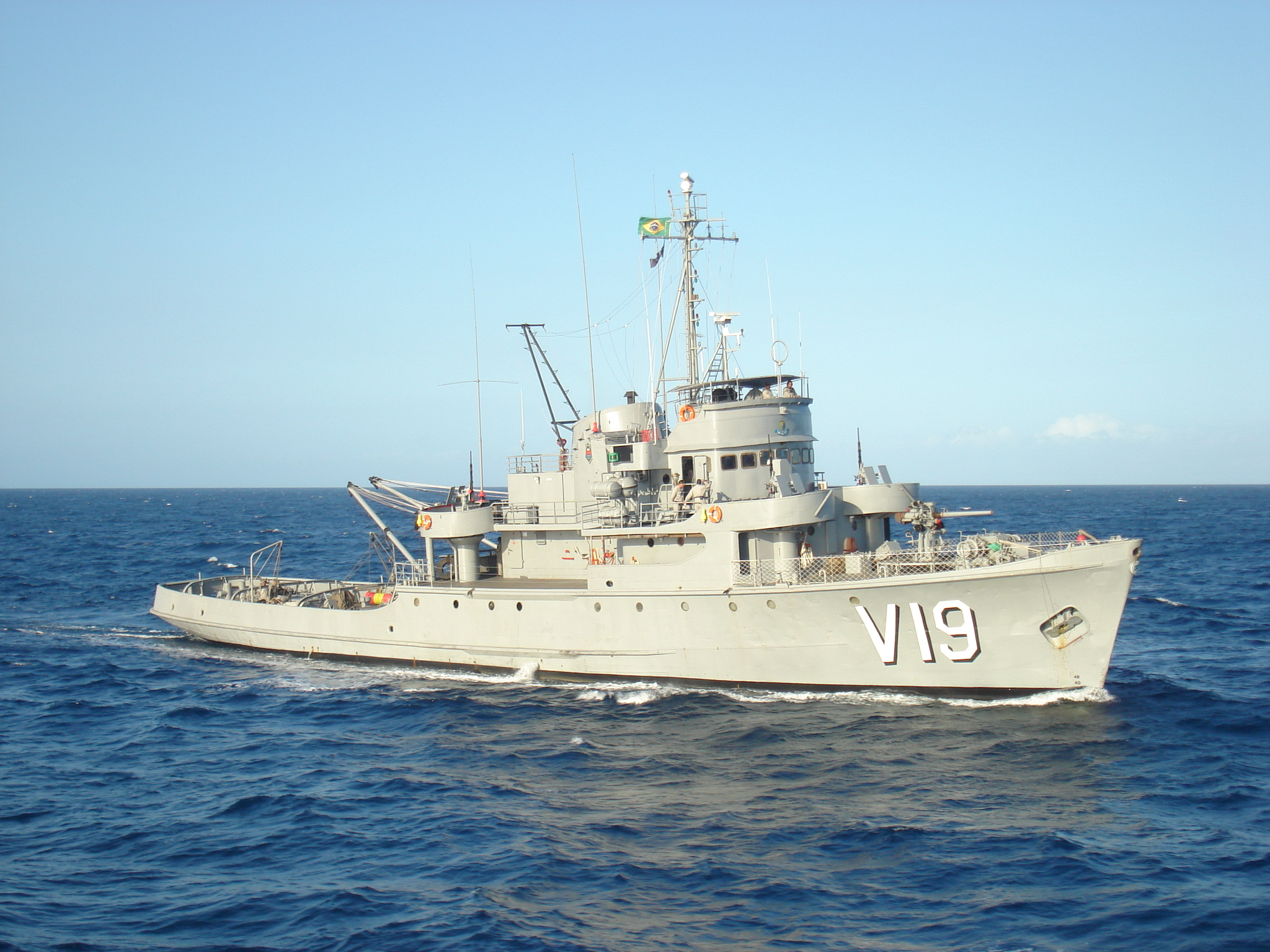 Arquivo liberado pela Marinha do Brasil através de projeto GLAM com Wiki Educação Brasil